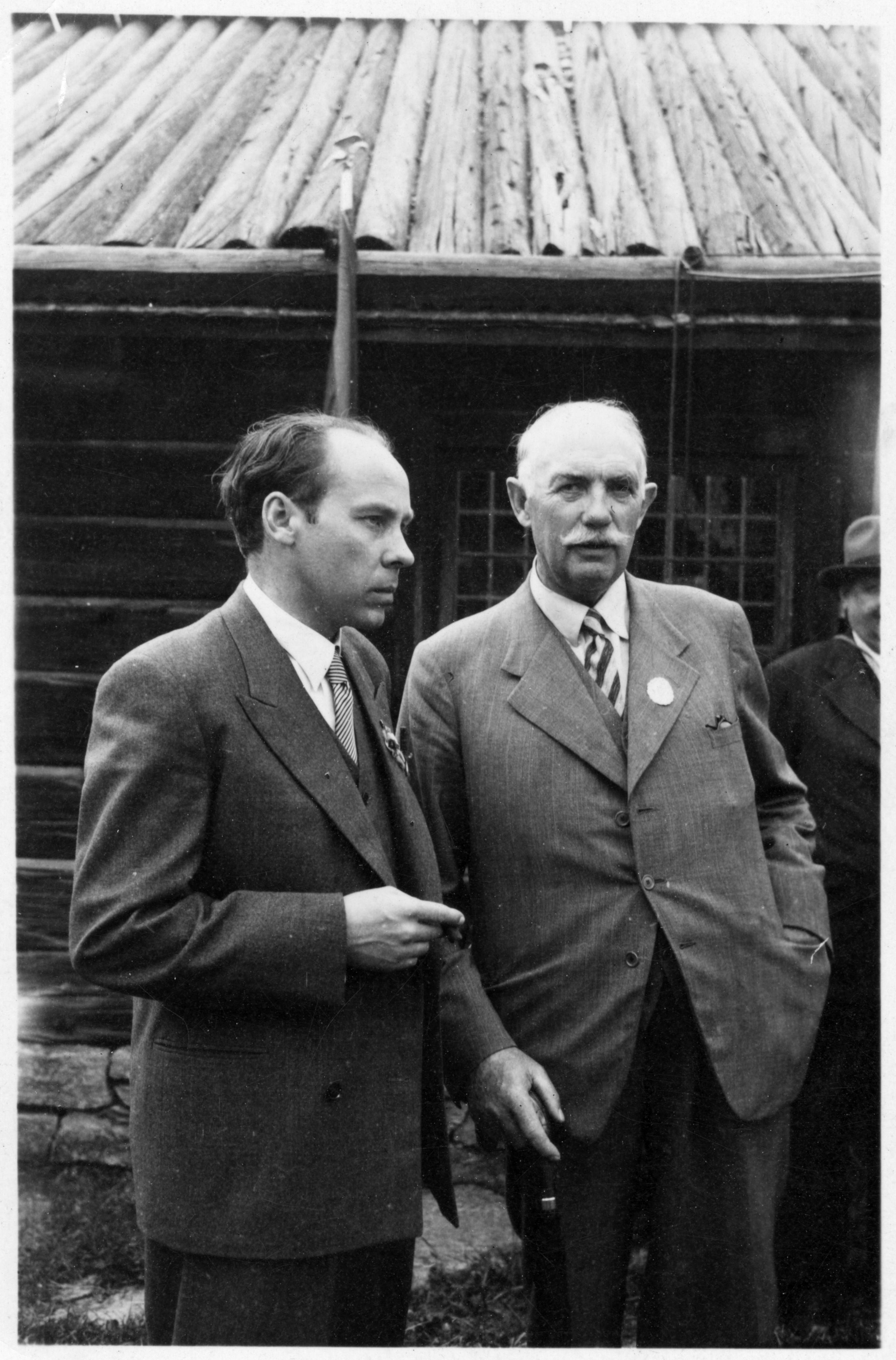 Axel Pehrsson Bramstorp på stämman i Östersund 1946, här tillsammans med riksombudsman i SLU Einar Gustafsson.